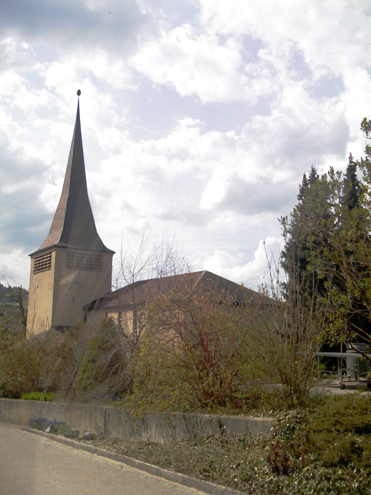 Lütisburg, protetstant church, Toggenburg, Switzerland - Lütisburg en Togenburgo, protestanta preĝejo, Svislando